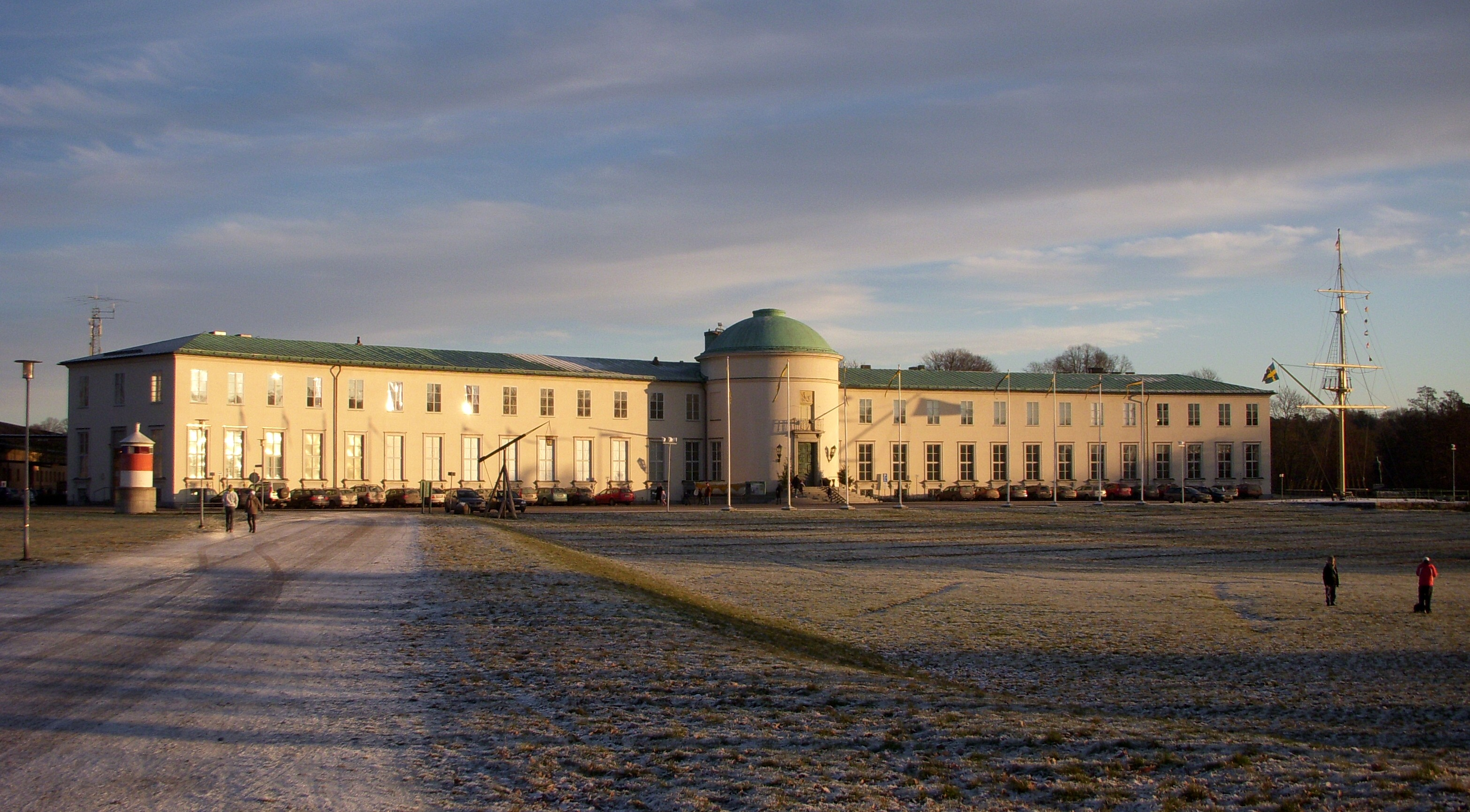 Sjöhistoriska museet i Stockholm